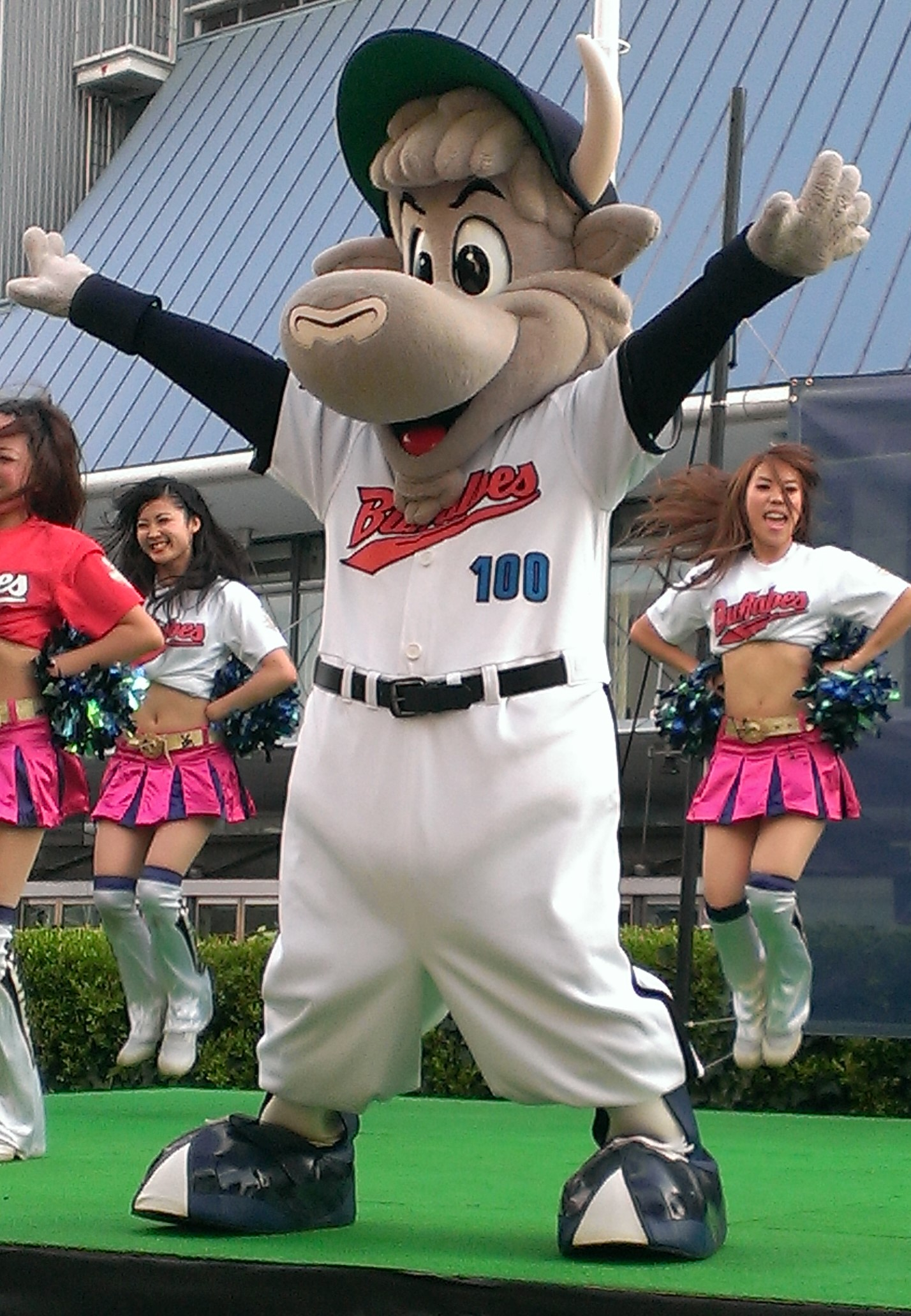 大阪近鉄バファローズマスコットのバフィリード。京セラドーム大阪にて。